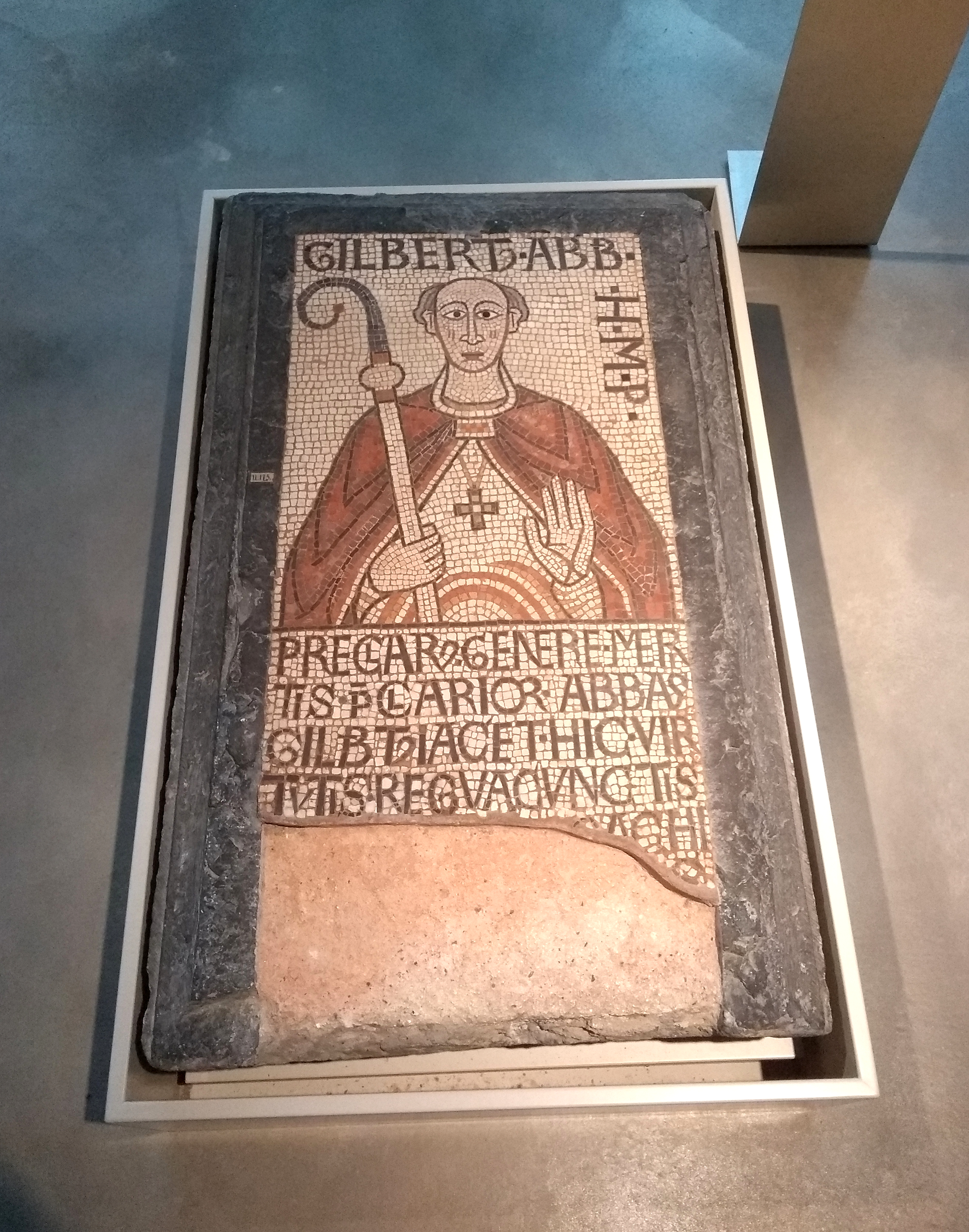 Grabplatte von Gilbert, dem ersten Abt des Klosters Laach, aus der Kirchenkrypta der Benediktinerabtei Maria Laach, heute im Rheinischen Landesmuseum Bonn